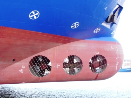 Blick auf die drei Querstrahlruder im Bug